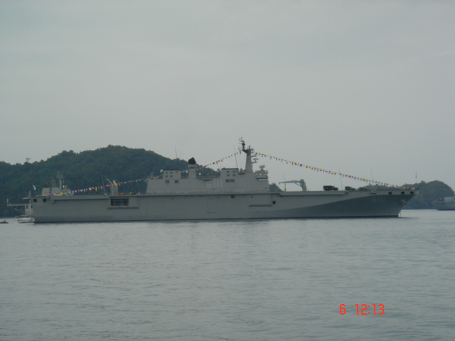 Kapal Dokdo, mungkinkah kapal kelas ini menyertai TLDM di masa akan datang?